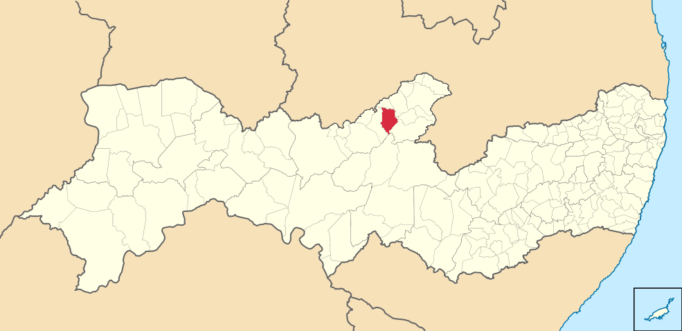 Mapa de Afogados da Ingazeira (2)